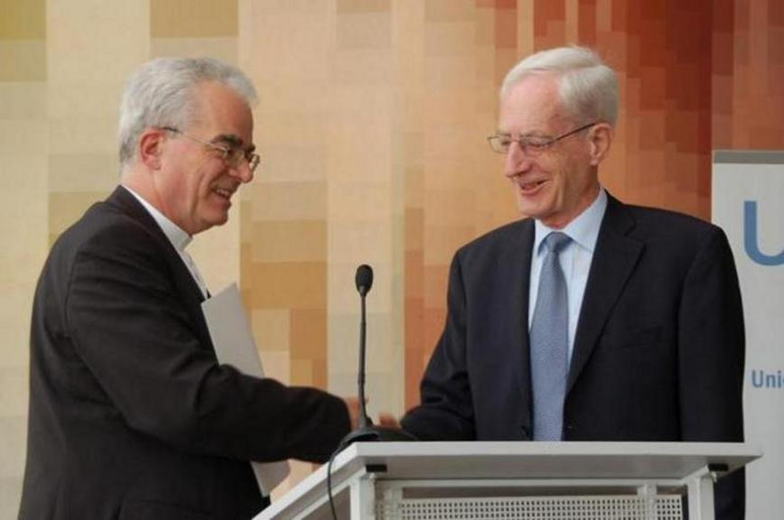 Martin Schindehütte, Leiter des Amtes der Union Evangelischer Kirchen (UEK), übergibt die Preisurkunde des Karl-Barth-Preises 2008 an den Preisträger 2008, Jürgen Schmude (während der EKD-Synode vom April/Mai 2009 in Würzburg, Deutschland).